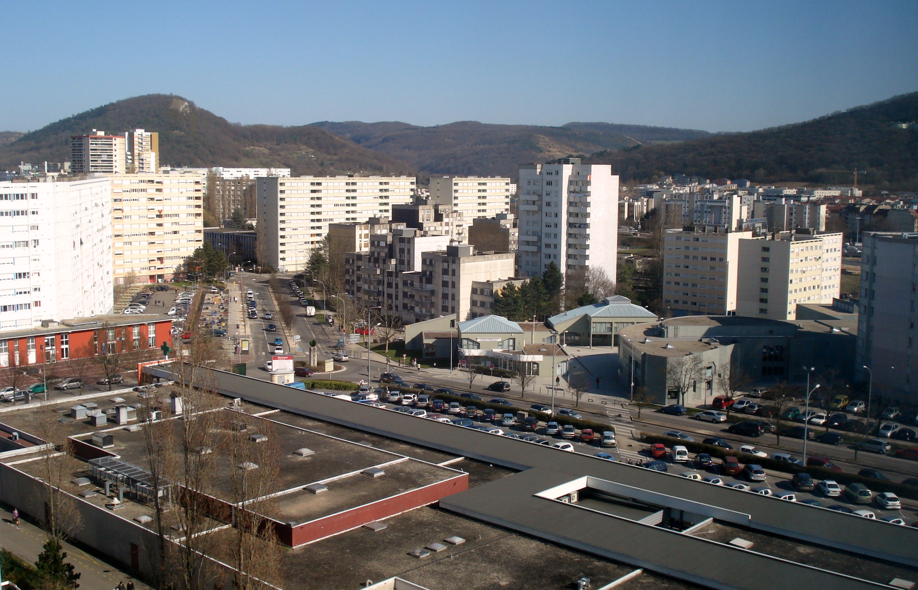 L'avenue d'Île-de-France à Planoise, dans la ville de Besançon (Doubs, France).